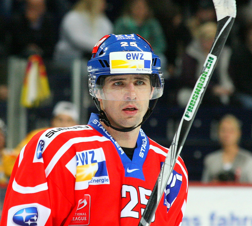 Radoslav Suchy avec les ZSC Lions